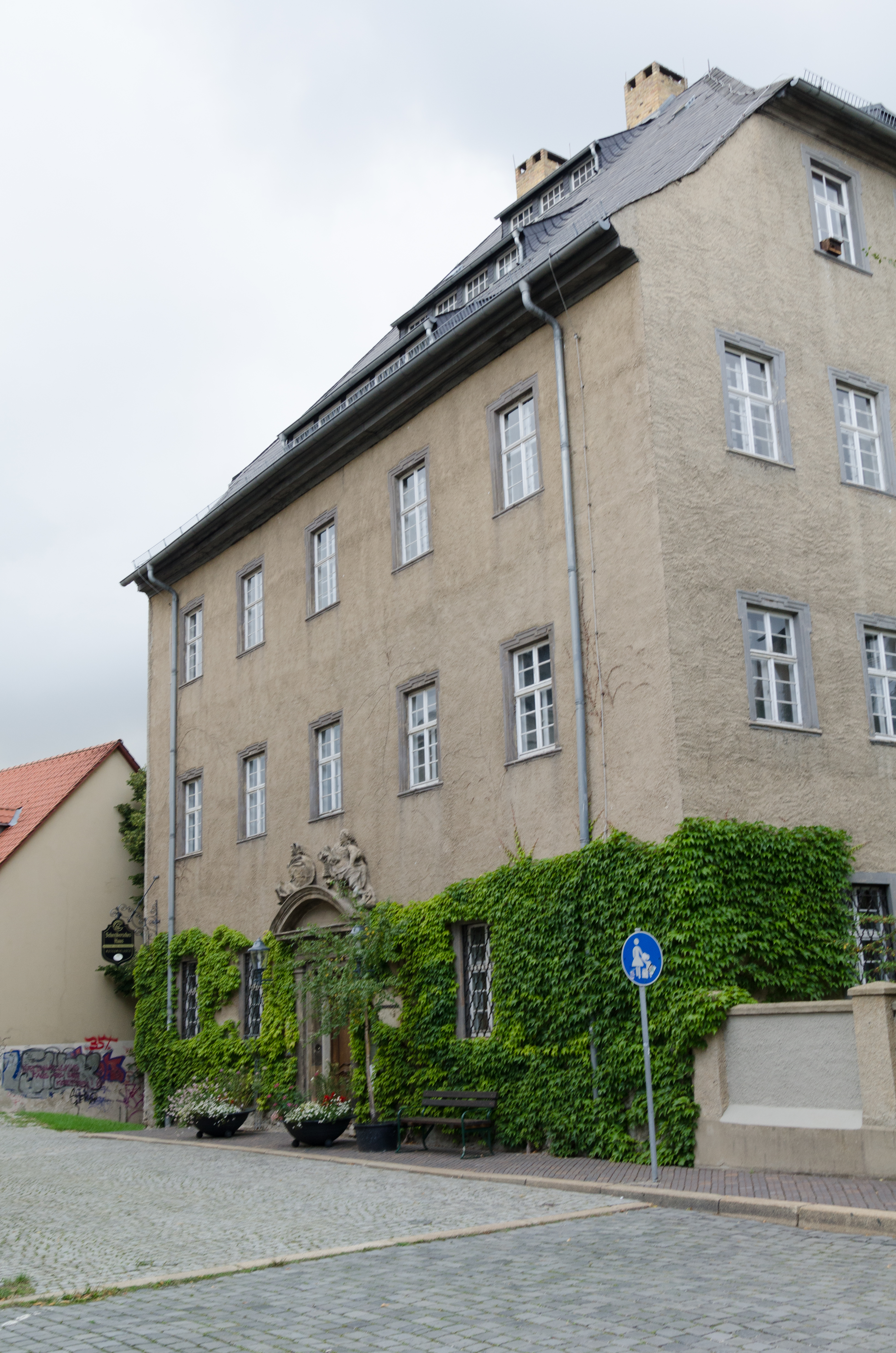 Gera, Nicolaiberg 3